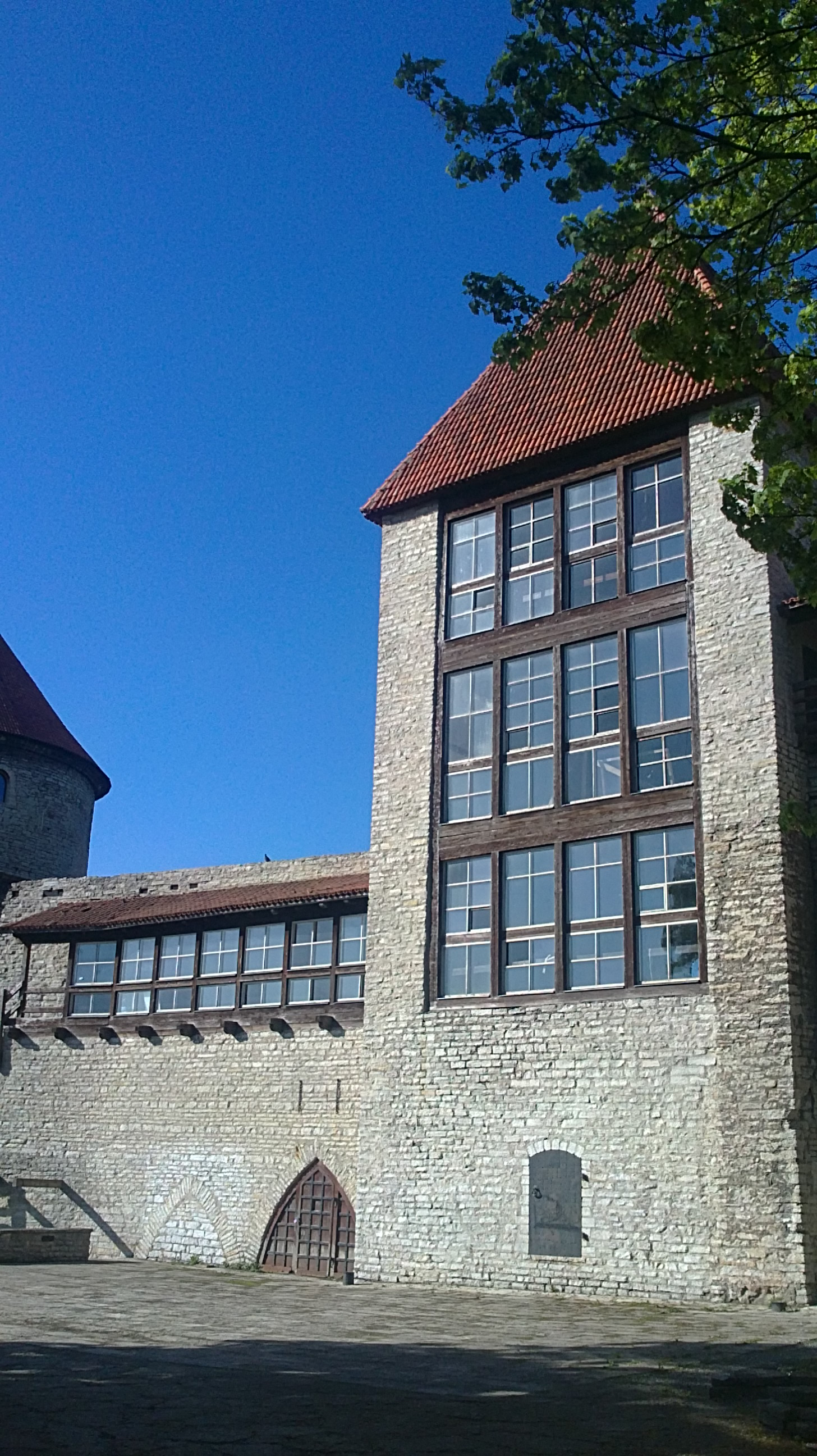 Neitsitorn ja osa taastatud Tallinna linnamüüri